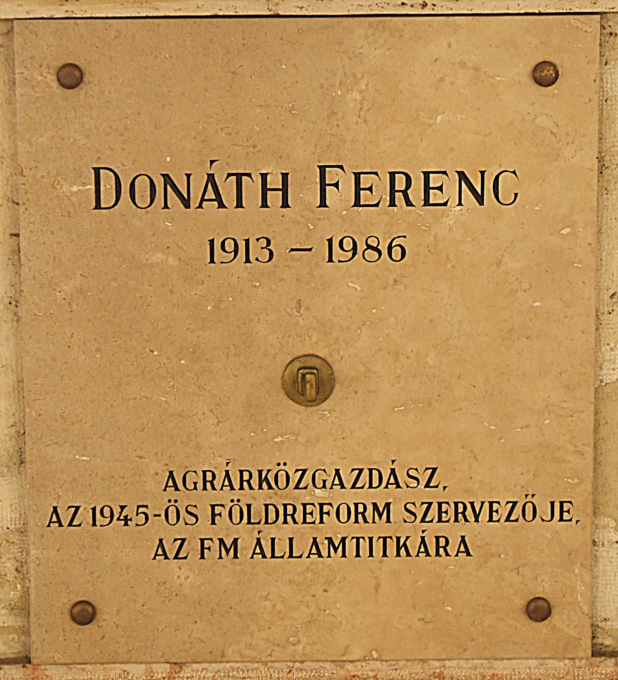 Donáth Ferenc szobor, emléktábla részlet